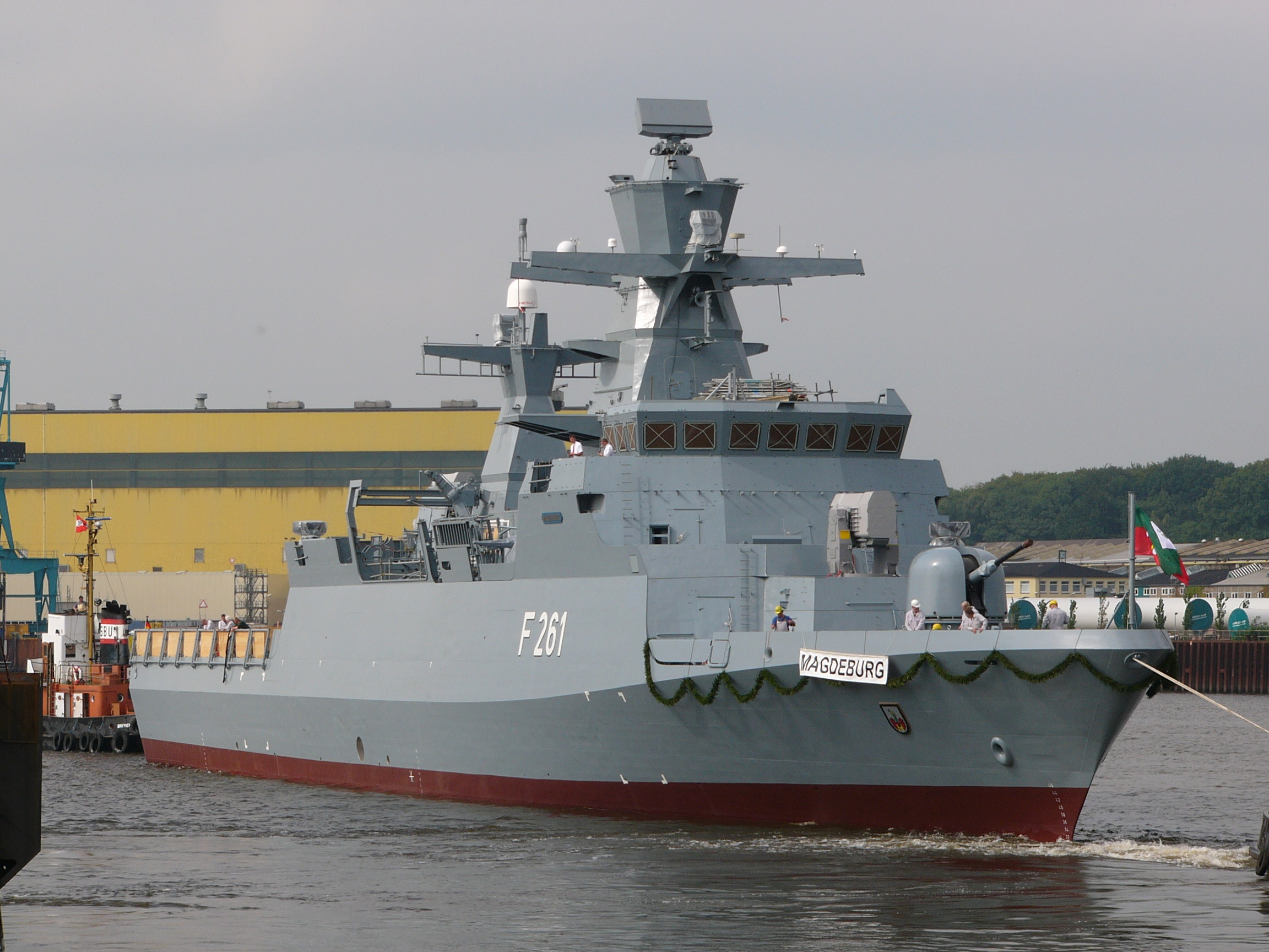 Korvette Magdeburg nach der Taufe am 06.09.2006,Braunschweig-Klasse K130 der deutschen Marine, Bild selbst erstellt.